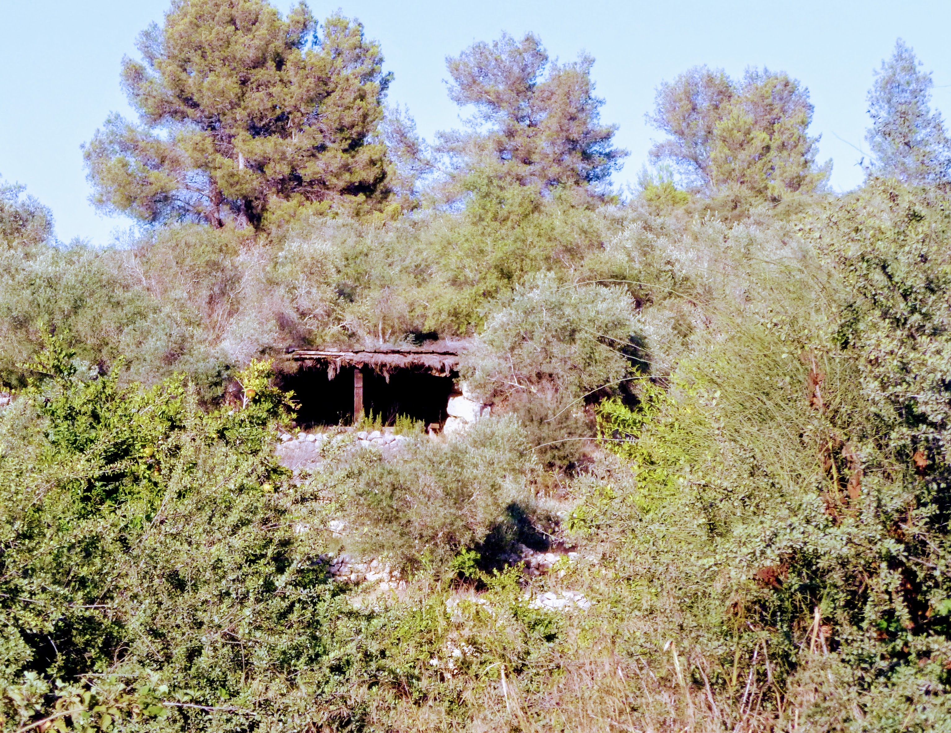 נוף בשמורת נאות קדומים ליד מודיעין